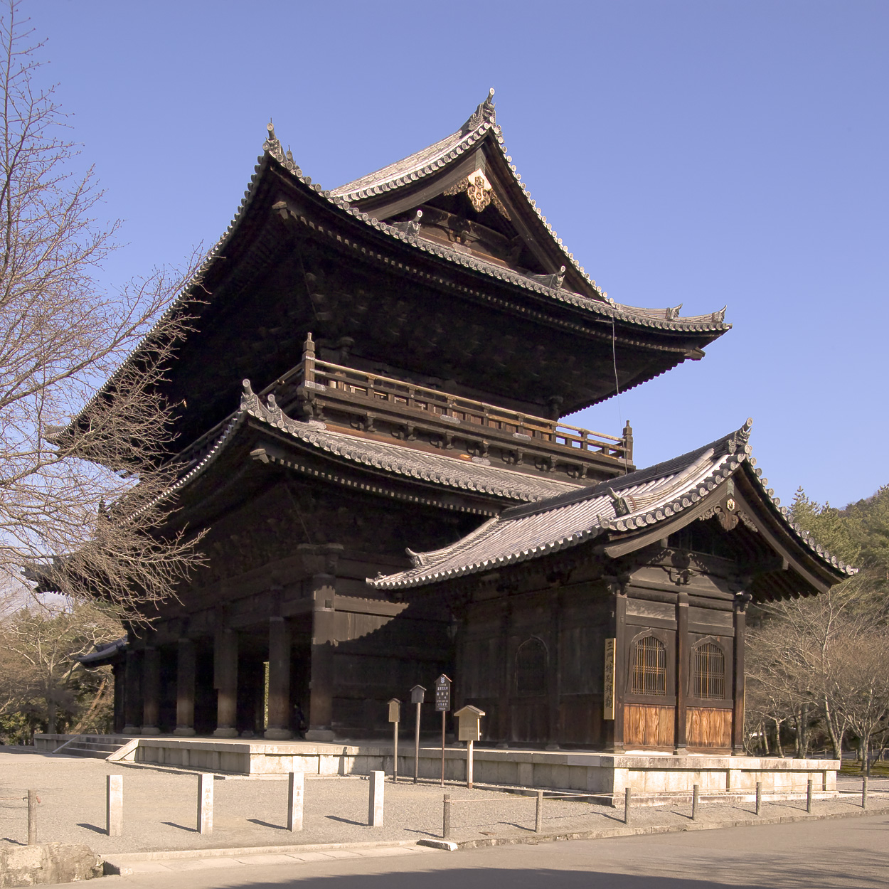 Sanmon, Nanzen-ji, Kyoto, Japan. 南禅寺の三門。